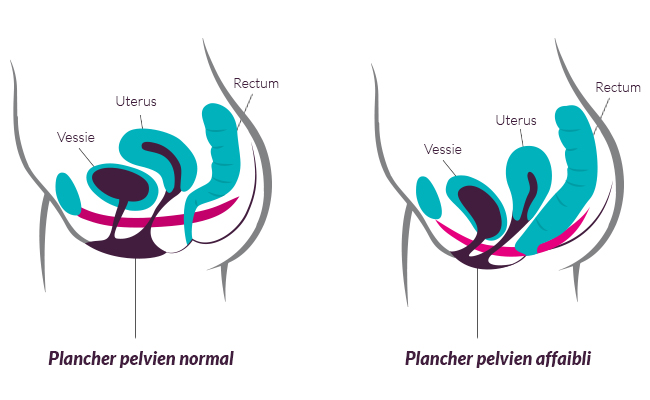 Différence entre un plancher pelvien normal et un plancher pelvien affaibli par le temps ou par les grossesses